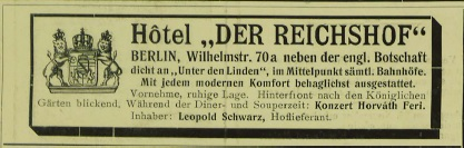 Anzeige des ehemaligen Berliner Hotels "Der Reichshof" (in der Wilhelmstraße 70a) von 1904.